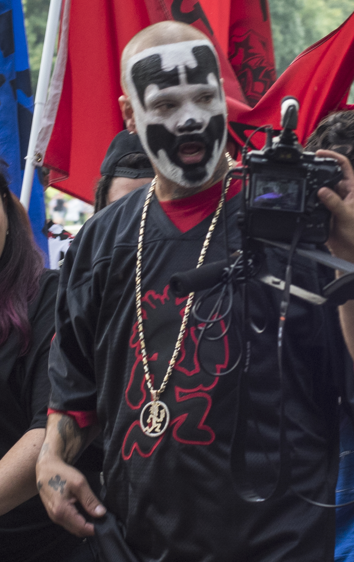 Juggalo March